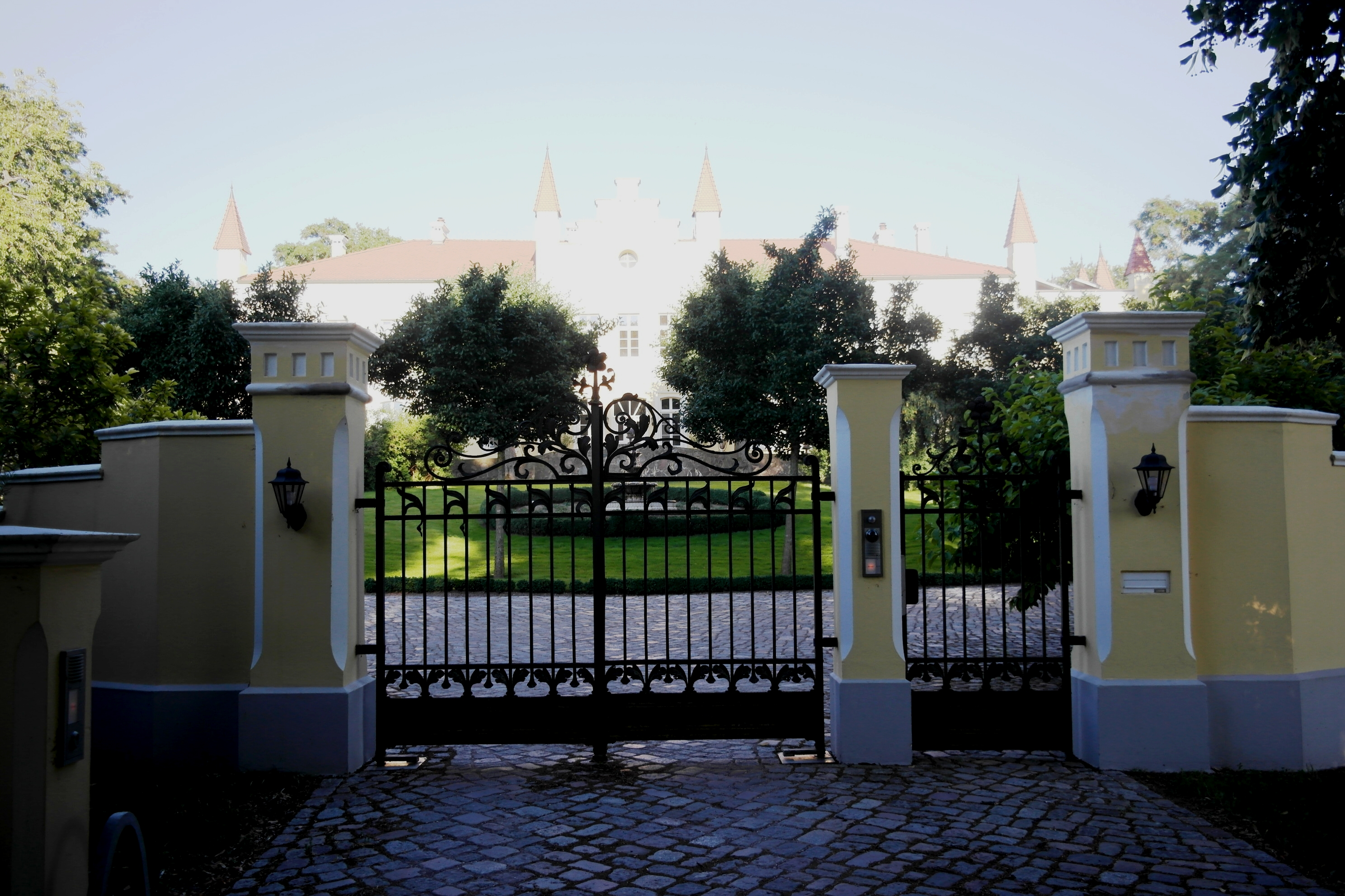 Gutshaus in Cammin mit Tor